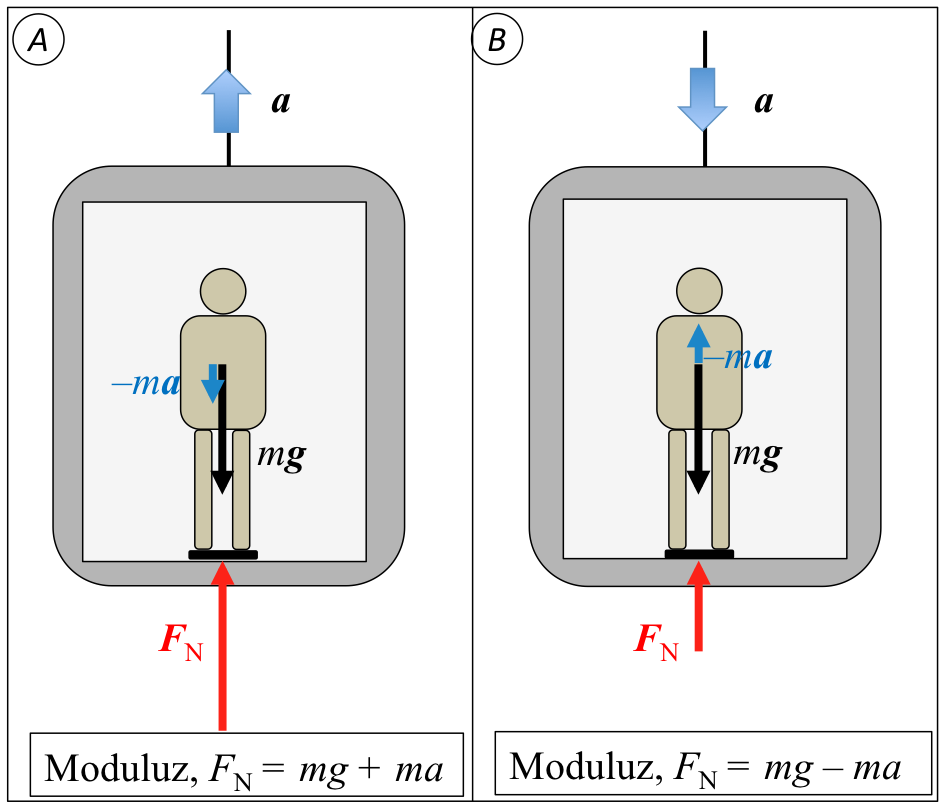 Igogailuak azelerazioa izatean, gure gorputzean eragiten duten indar erreal eta inertzia-indarren eskema.